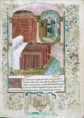 Guillaume de Digulleville songeant à la Jérusalem céleste. Soissons - BM - ms. 0208 (f. 001).